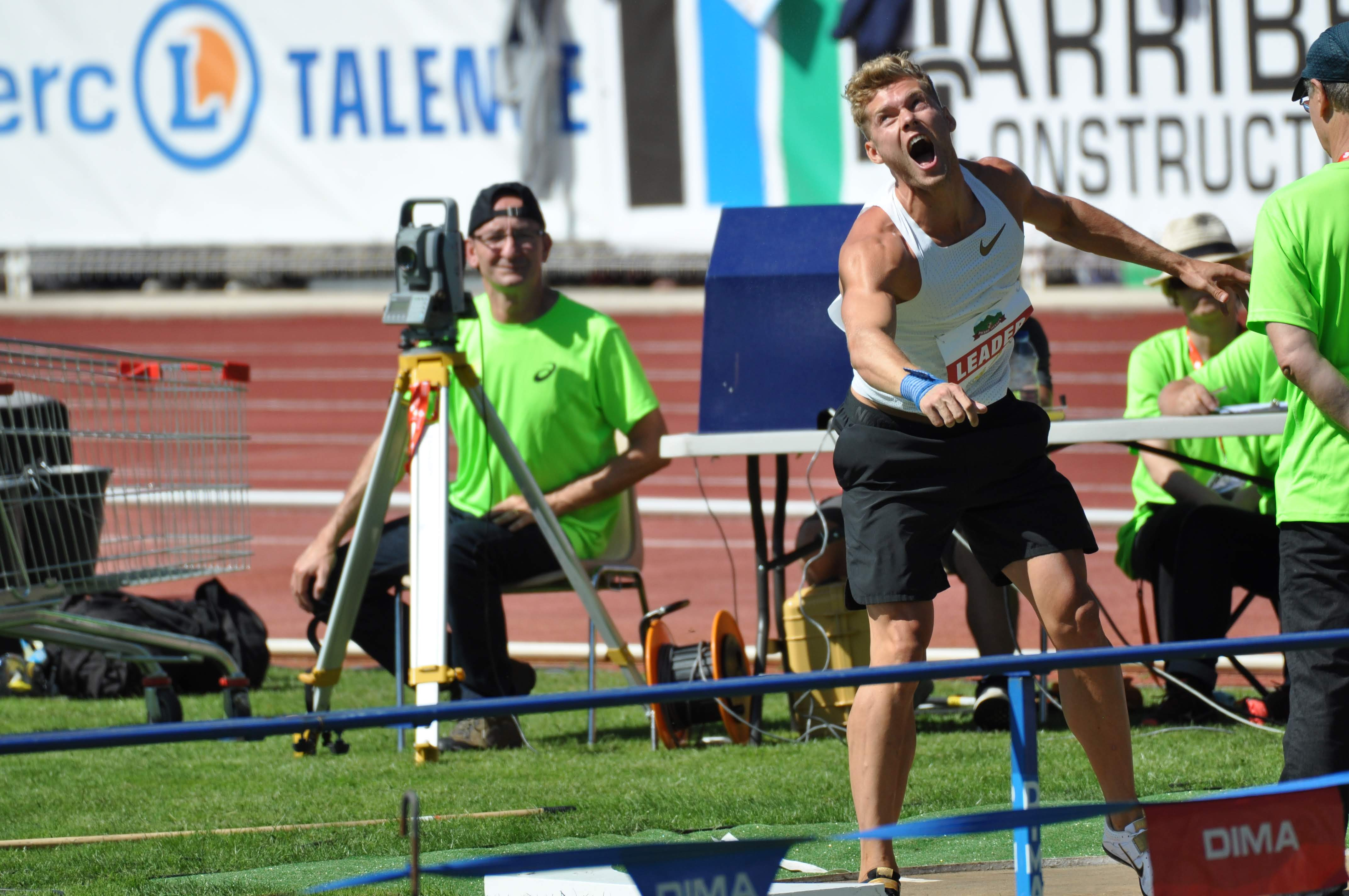 Decastar, 15-16 septembre 2018